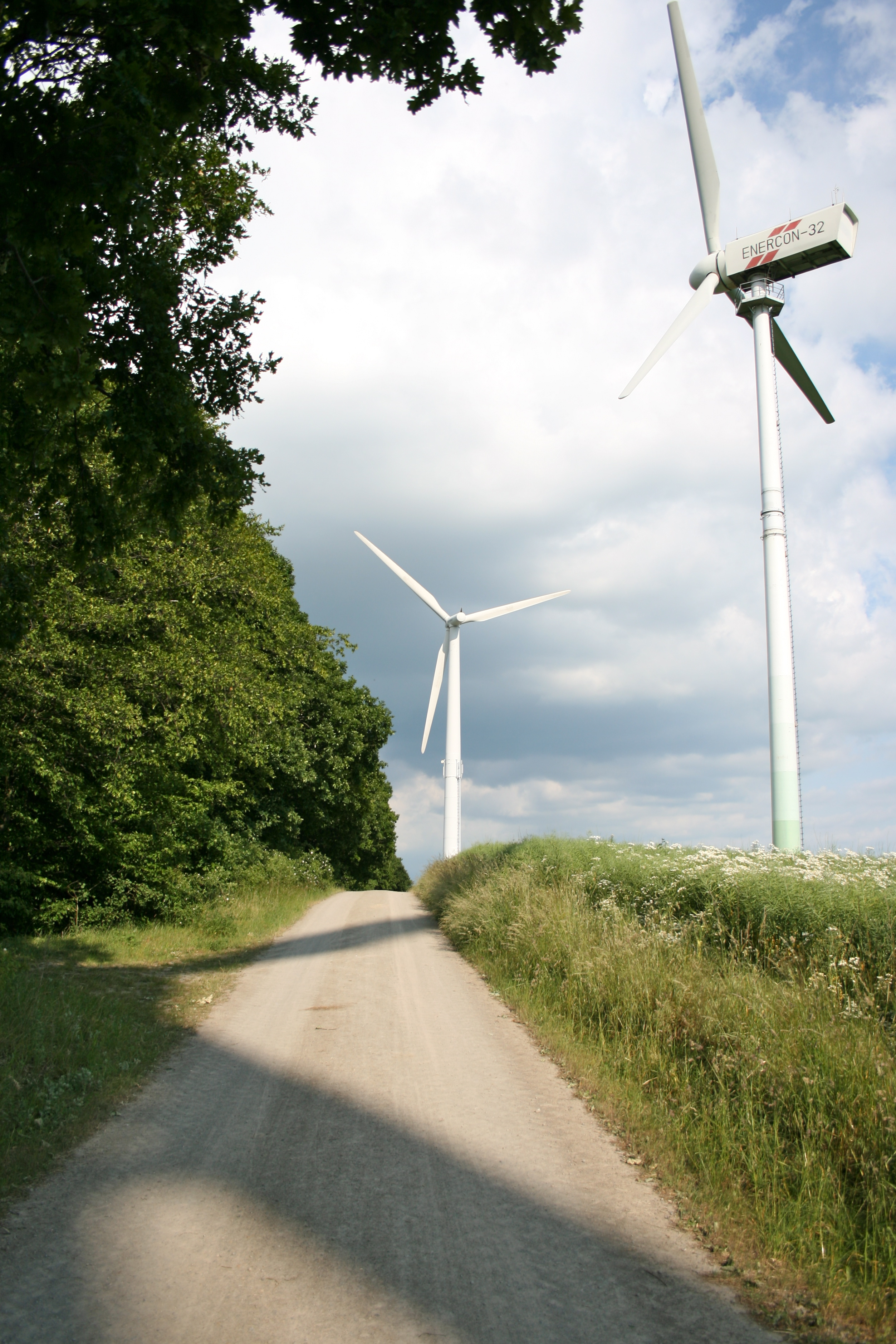 Windräder auf dem Vörier Berg, Holtensen bei Wennigsen